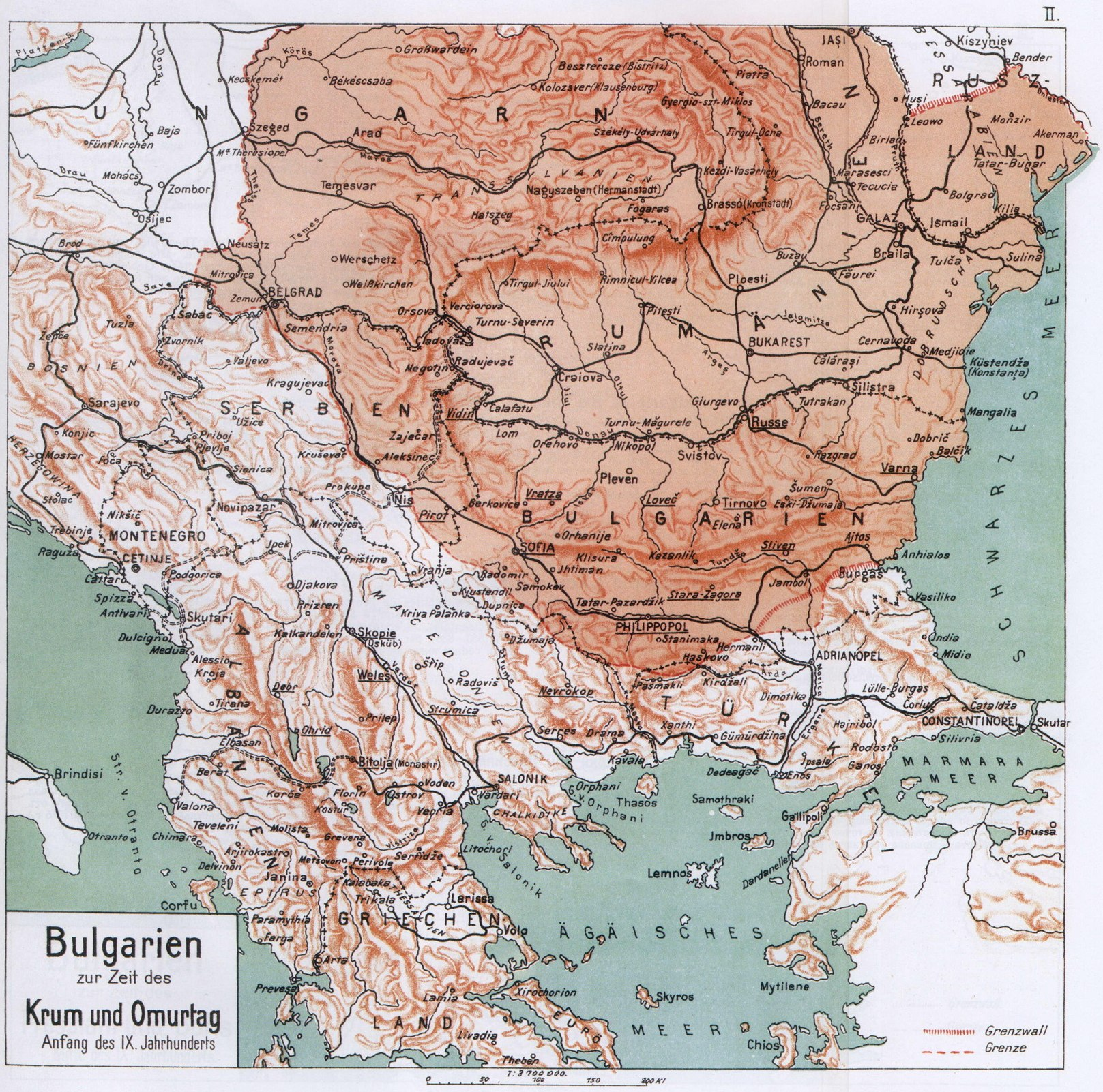 Карта на България по времето на хан Омуртаг